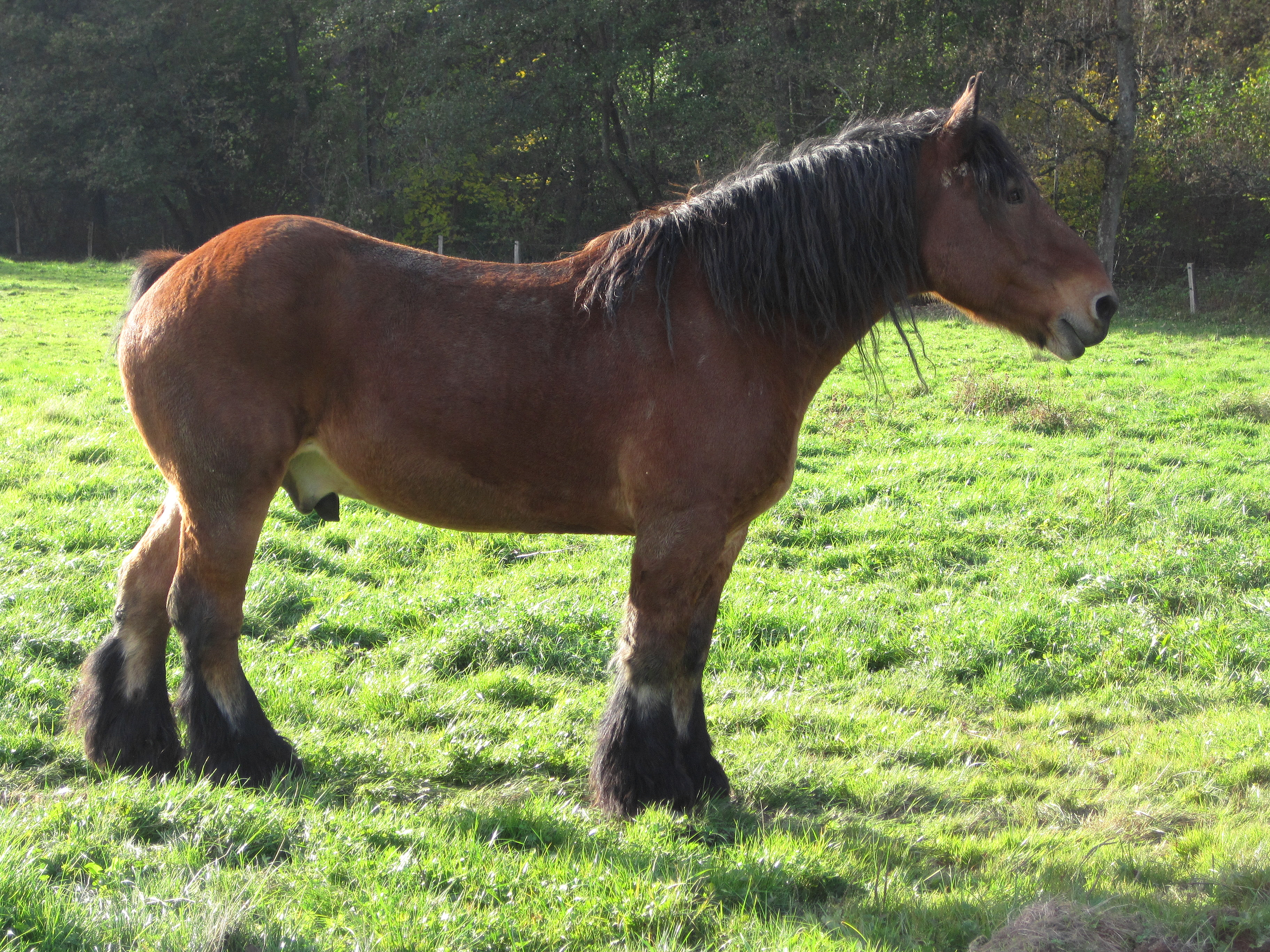 Étalon ardennais du domaine du Fourneau Saint-Michel à Saint-Hubert (Belgique).